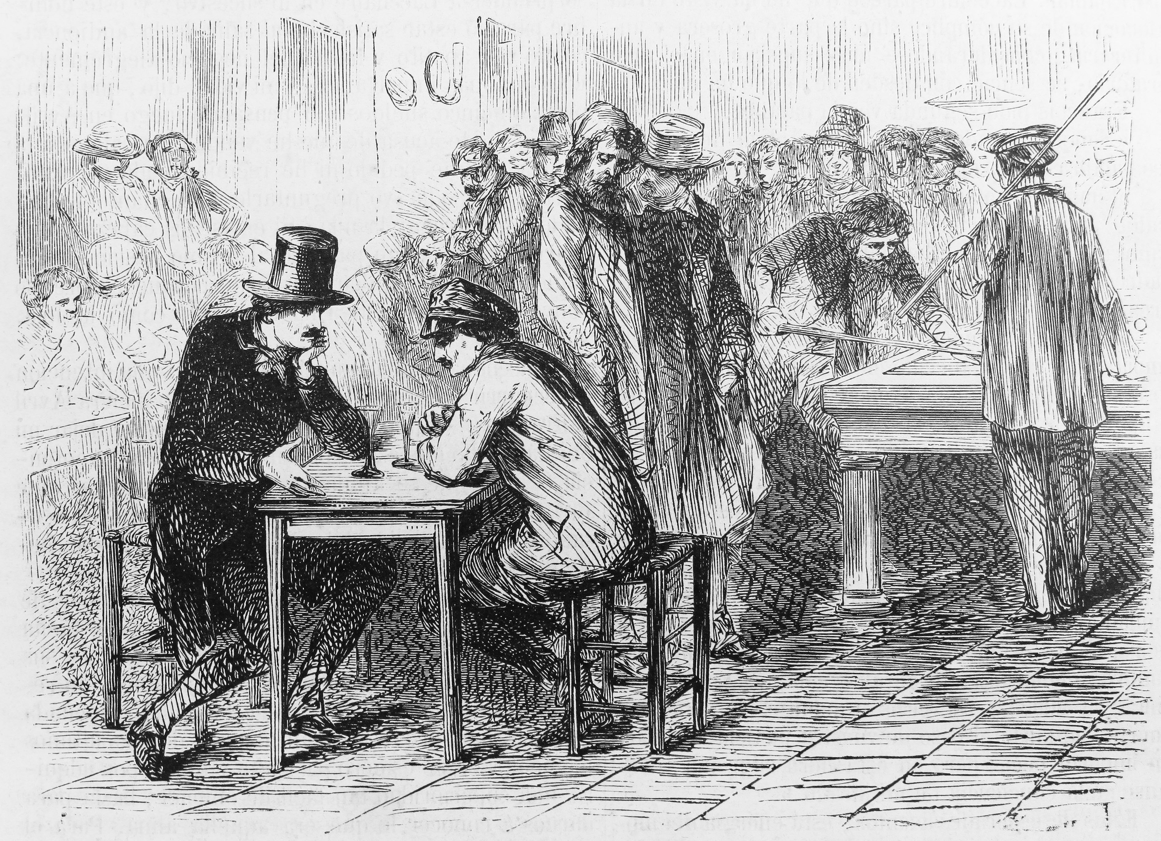 Robos y asesinatos por Lacenaire, Francois y Avril. "Lacenaire y Avril en la taberna." Ilustraciones de la obra : Anales dramáticos del crimen ó Causas célebres españolas y estranjeras [sic] / estractadas [sic] de los originales y traducidas, bajo la dirección de José de Vicente y Caravantes. - Madrid : Imprenta de Fernando Gaspar [etc.], 1858-1866. - Ed. il. con grabados...